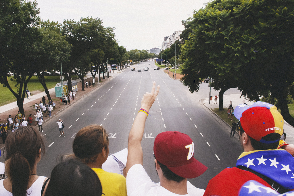 Venezolanos en Buenos Aires (2014)